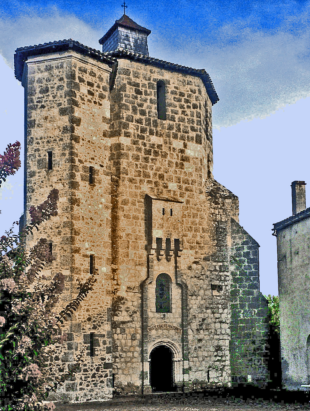 Tour de Saint-Martin de Houeillès (Lot-et-Garonne, France) .